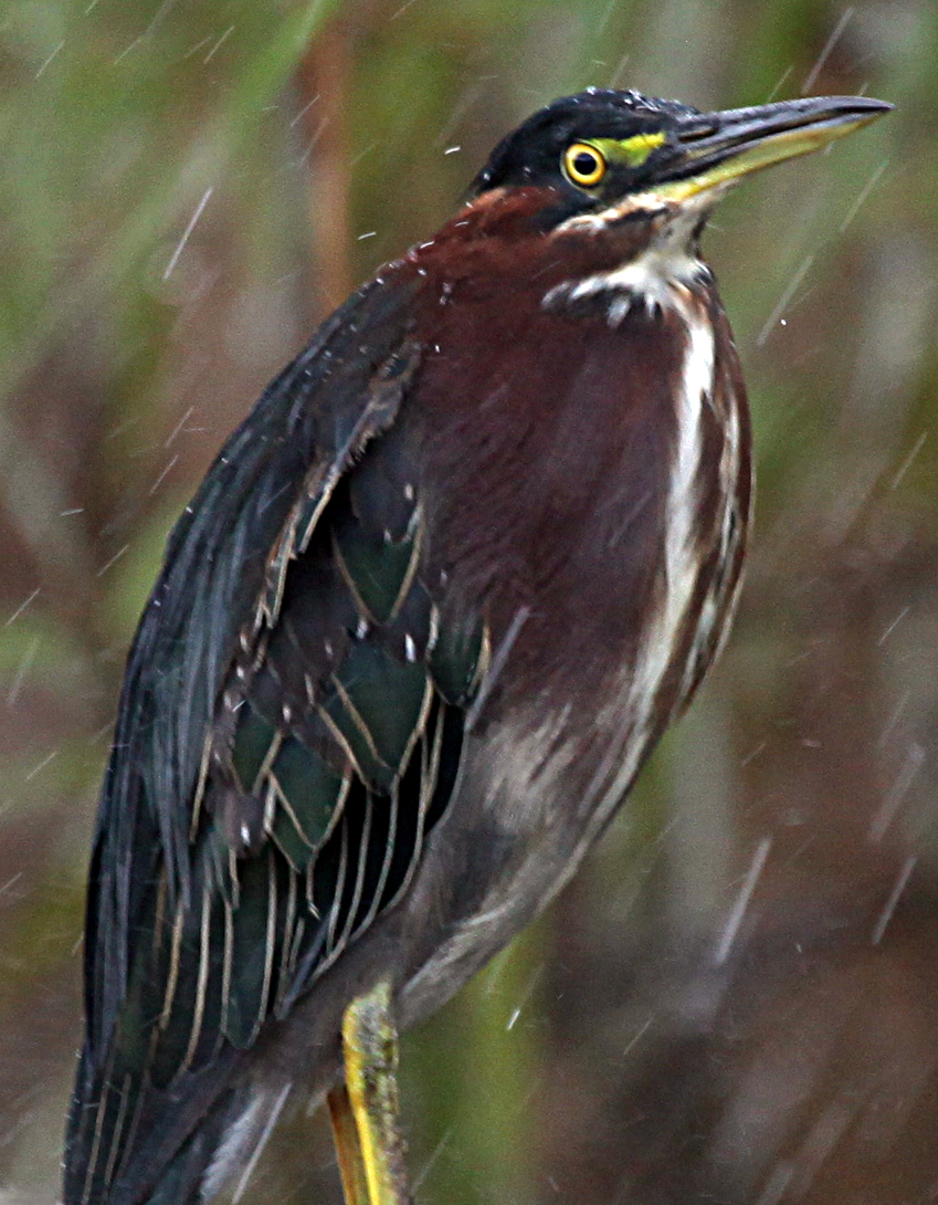 Little Green Heron in Rain